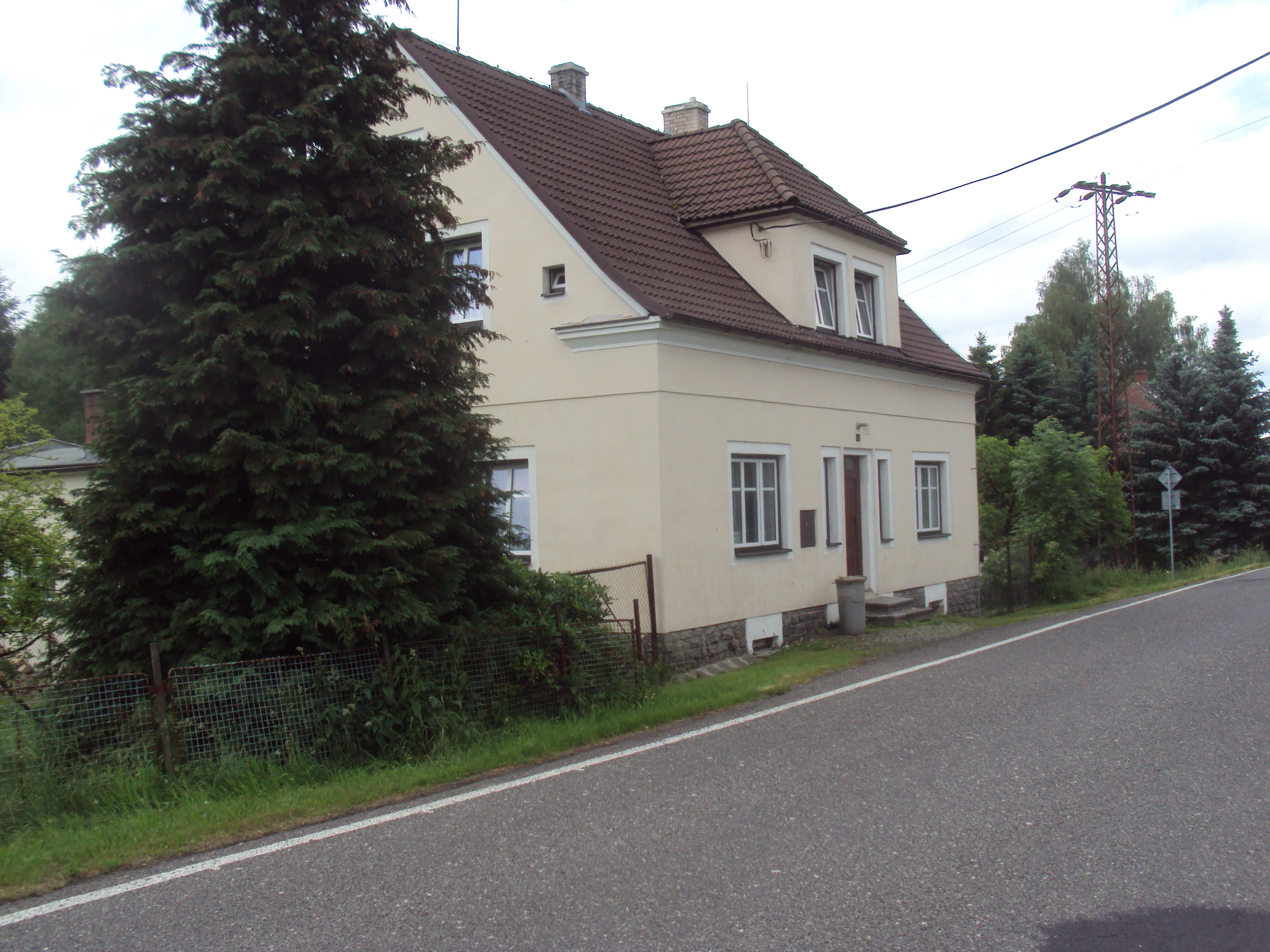 Ubytovna KČT Česká Lípa, Vlčí Hora čp.146